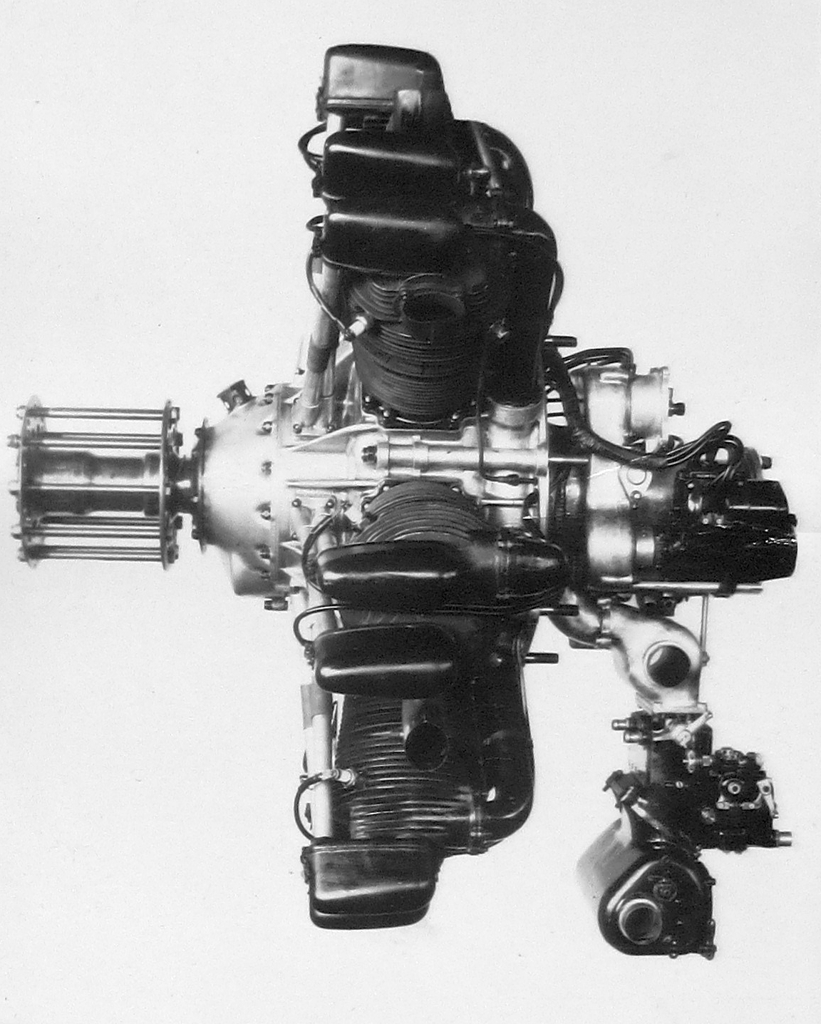 Walter Castor II, side view